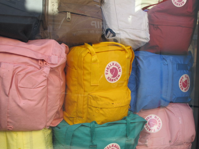 Fjällräven Kånken backpacks in Malmö